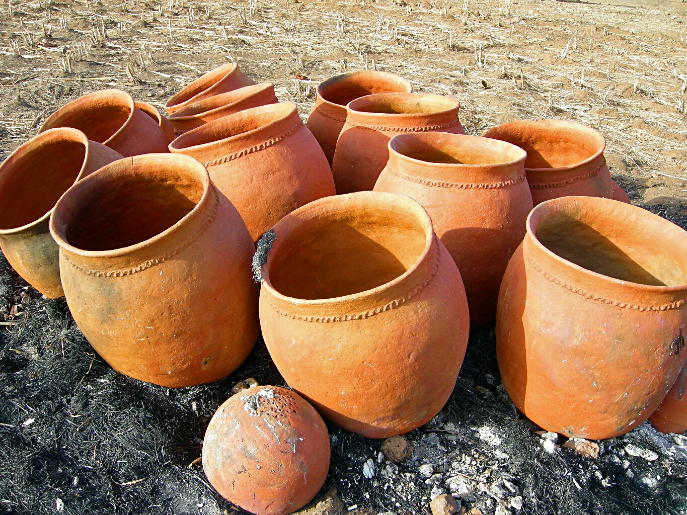 Burkina Faso: Töpfe in Dourtenga